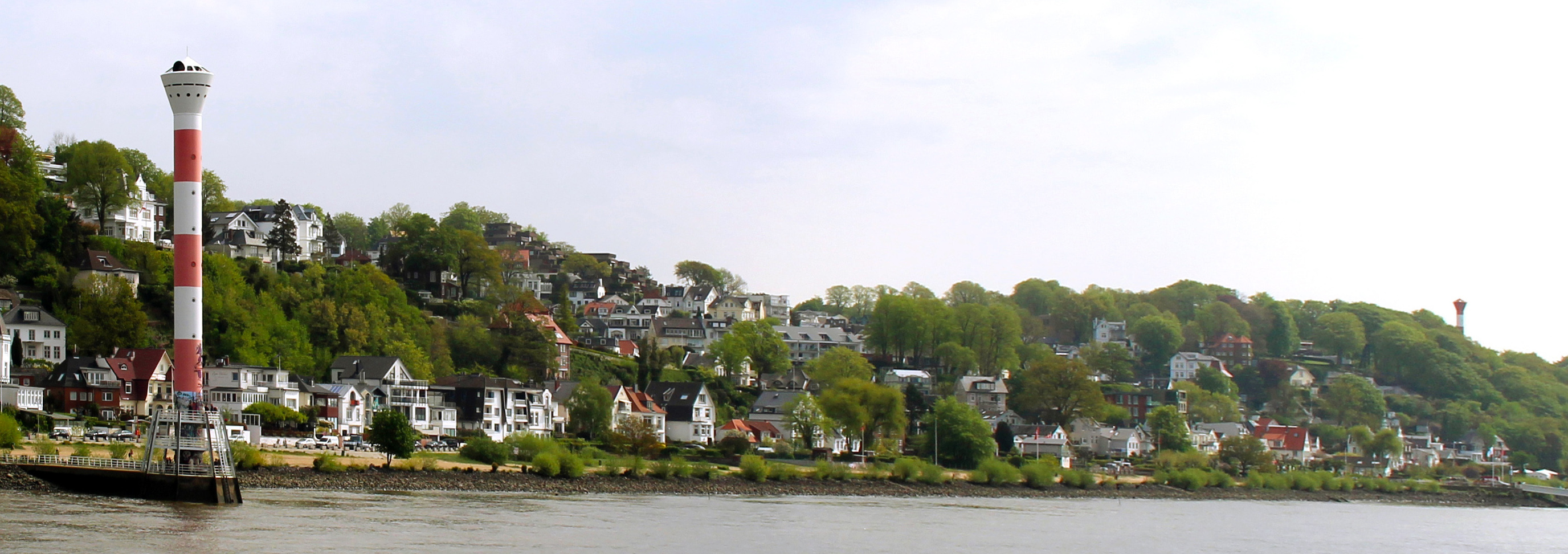 Die Richtfeuerlinie Blankenese mit dem Leuchtturm Unterfeuer Blankenese im Vordergrund und dem Leuchtturm Oberfeuer Blankenese im Hintergrund